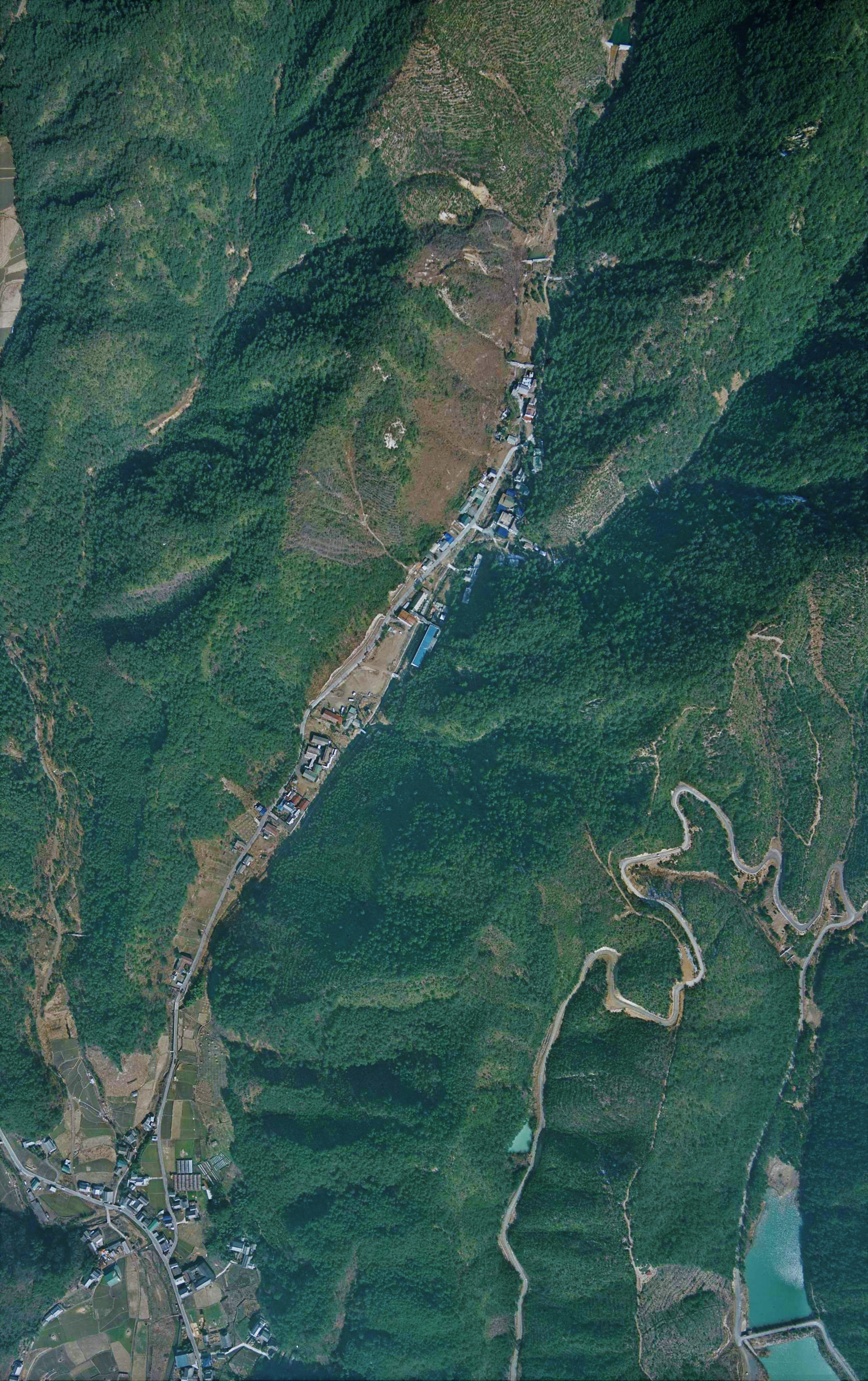 1975年の本郷温泉空撮写真。国土地理院のCCG746-C2B-7,CCG746-C2B-6より作成